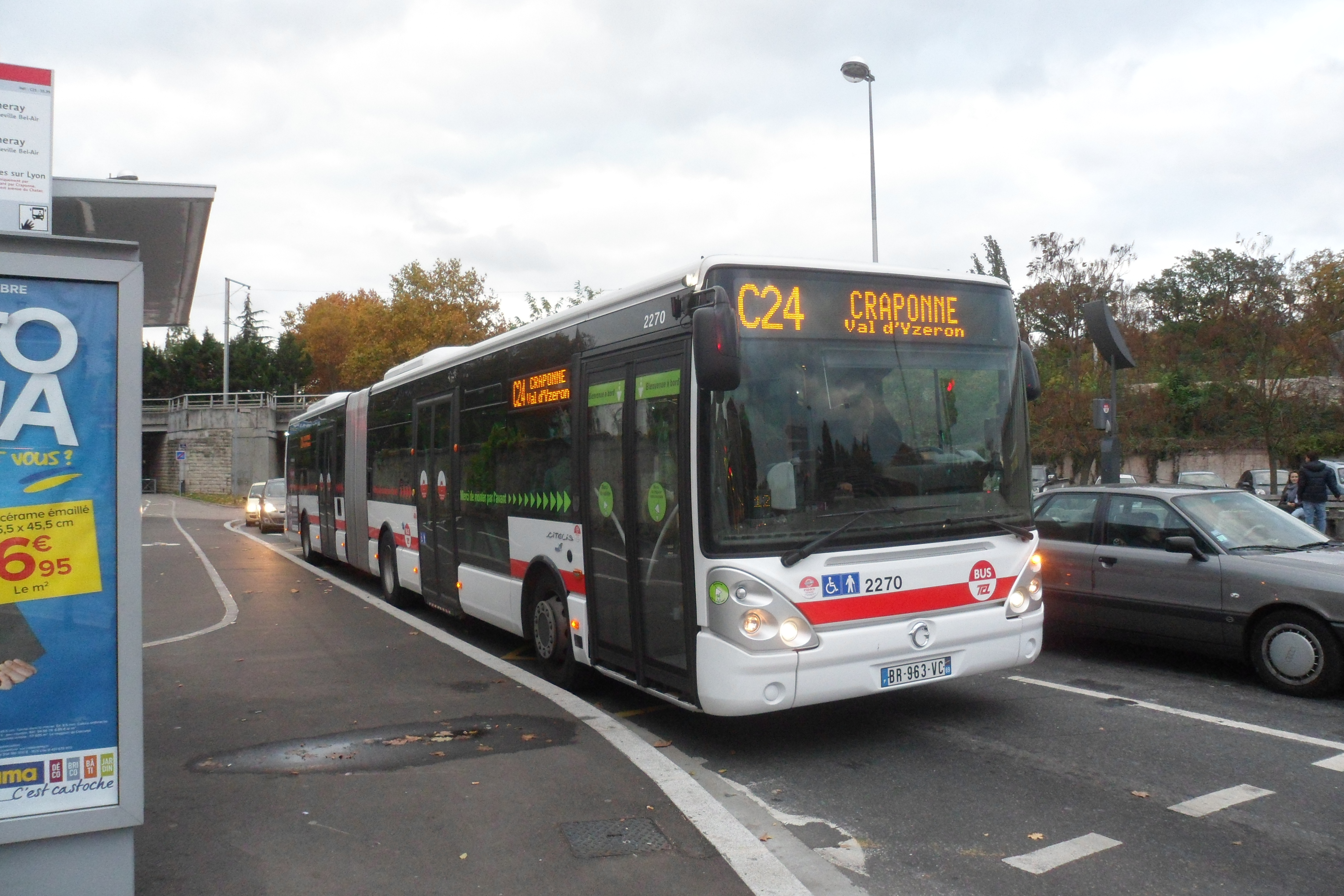 Irisbus Citelis 18 sur la ligne C24 du réseau TCL, en direction de Craponne.